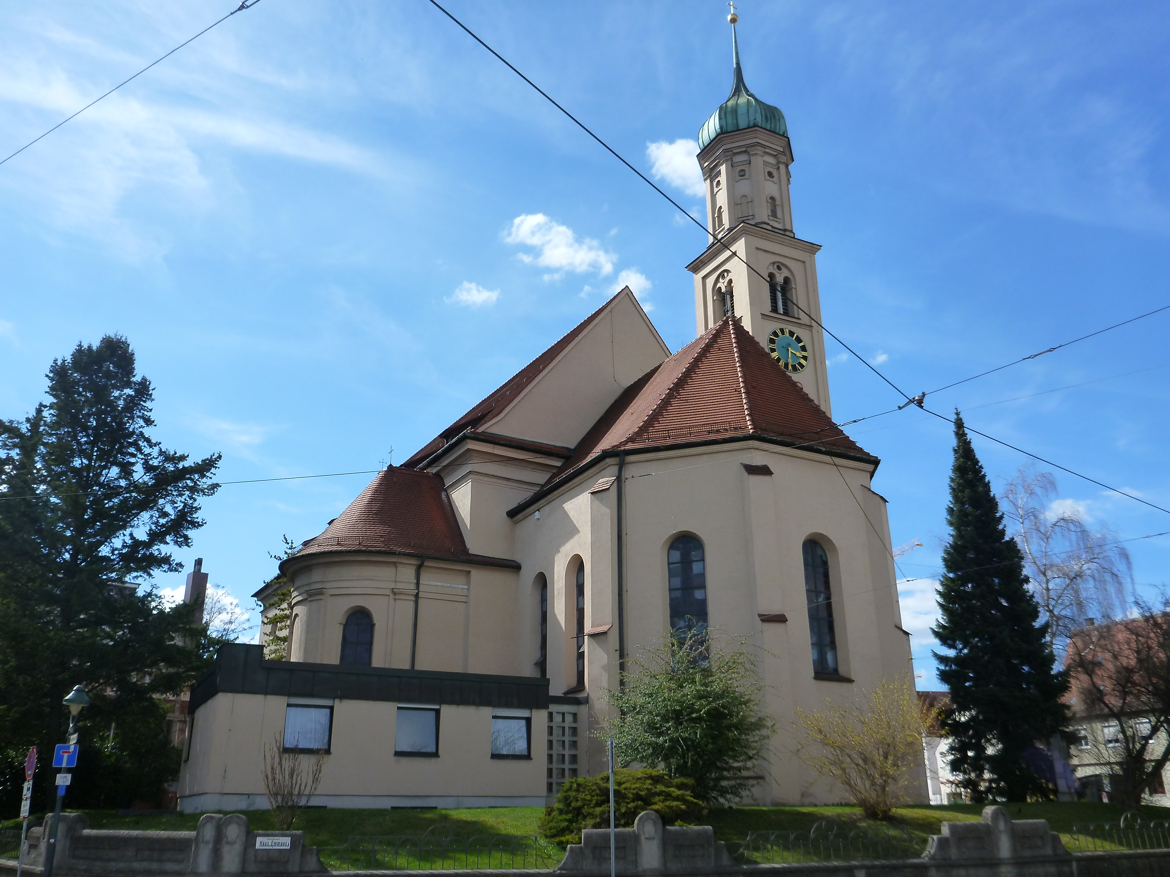 Ostansicht der Kirche